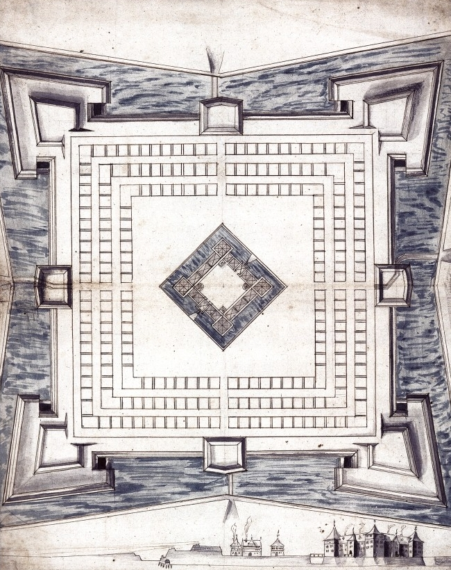 Freudenstadt, Idealplan von Heinrich Schickhardt um 1600 rechts unten das auf dem zentralen Platz geplante, aber nie errichteten Schlosses